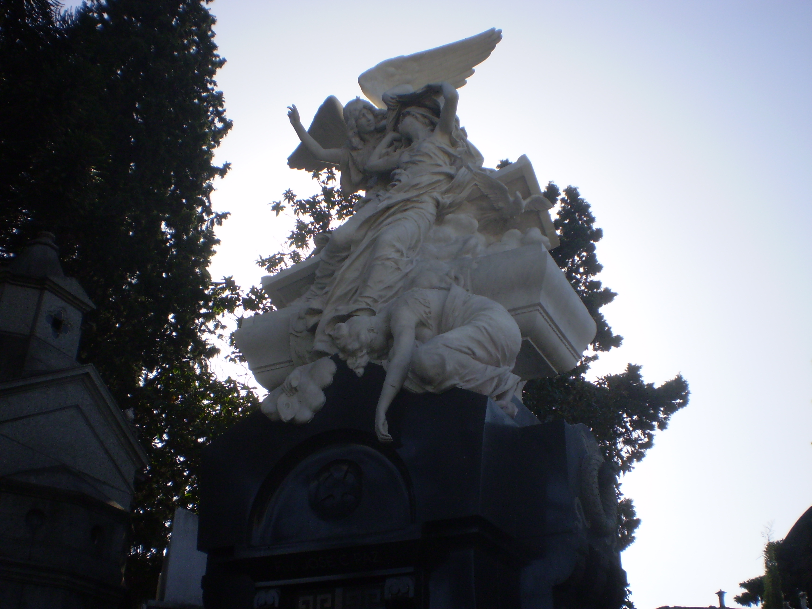 Bóveda de la flia de José Clemente Paz (fundador del diario La Prensa), Cementerio de la Recoleta, Buenos Aires. (Esculturas de Jules Coutan)